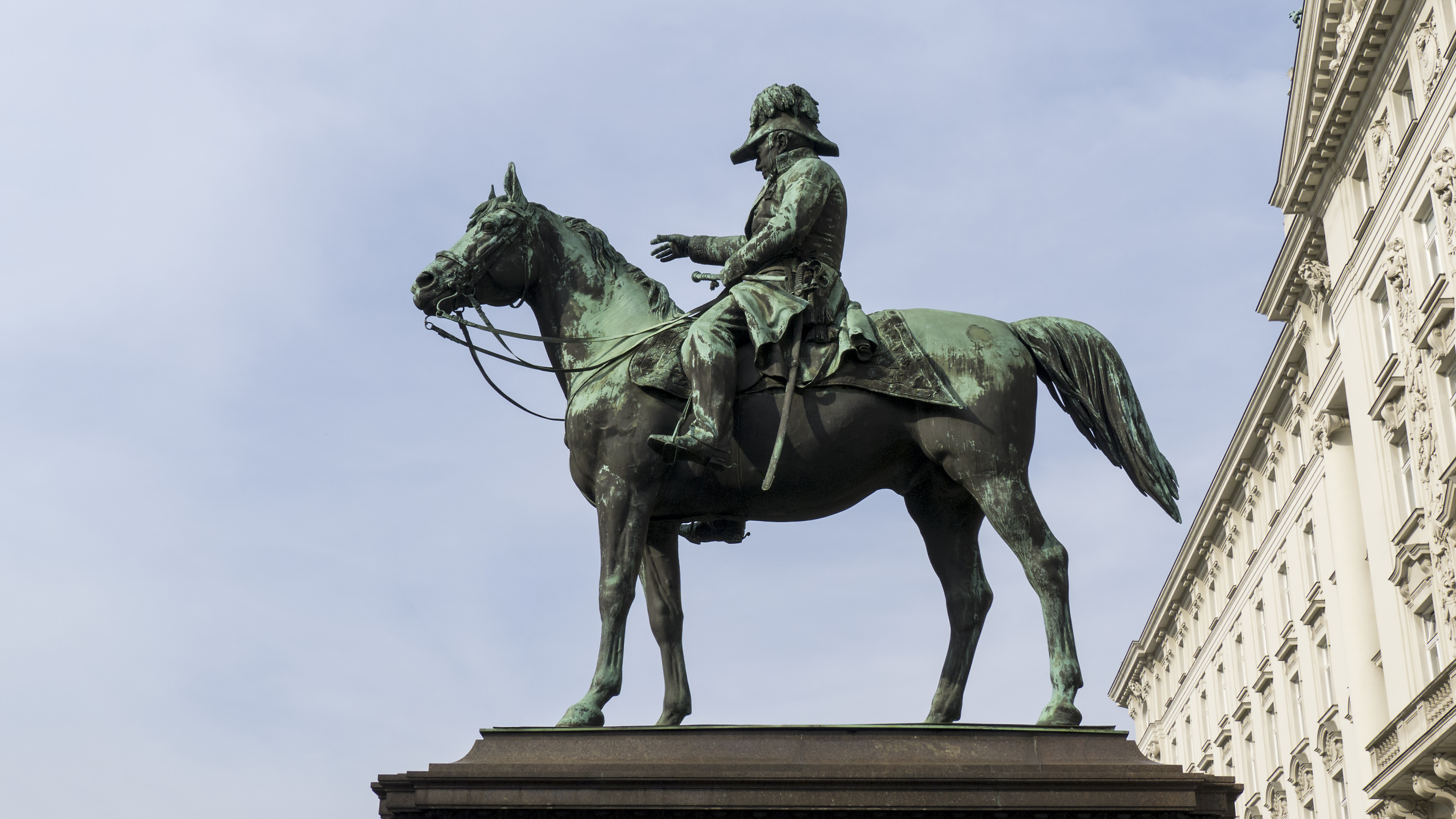 K.u.k Kriegsministerium in Wien 1, Radetzky-Denkmal